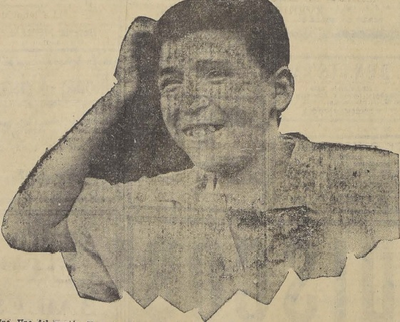 Guillermo Barrientos interpreta a Huacho Pelao en la película chilena de 1925 "El Húsar de la Muerte".